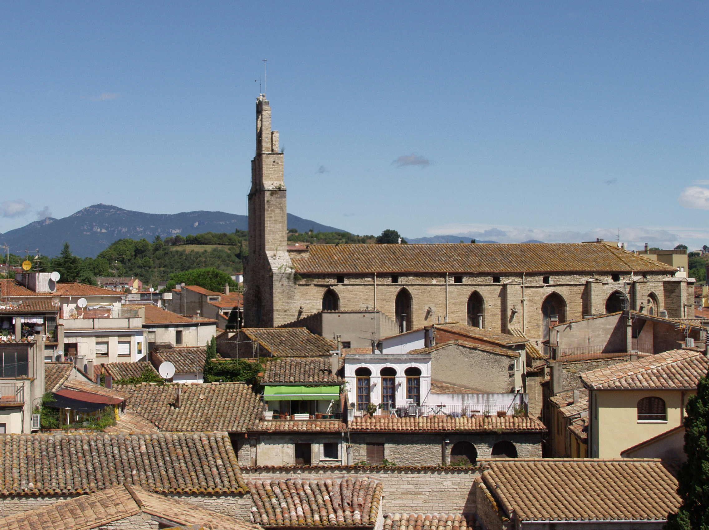 Església Santa Maria de Banyoles